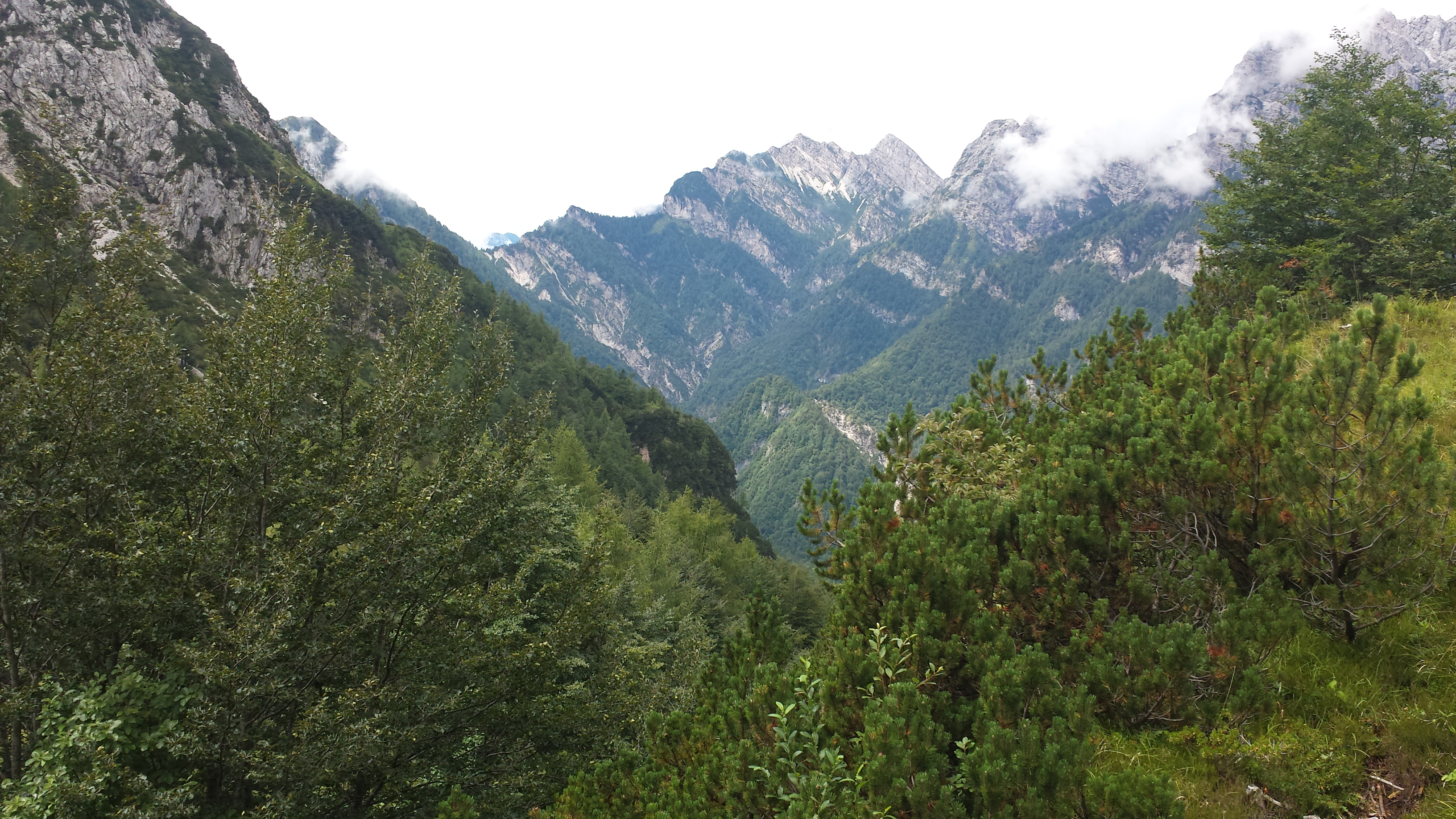 Il Monte Cornaget visto da Forcella Caserata